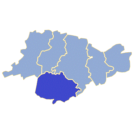 Powiat świebodziński - Gmina Skąpe